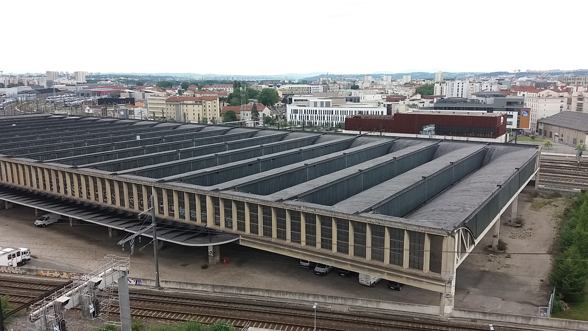 Entrepôts.